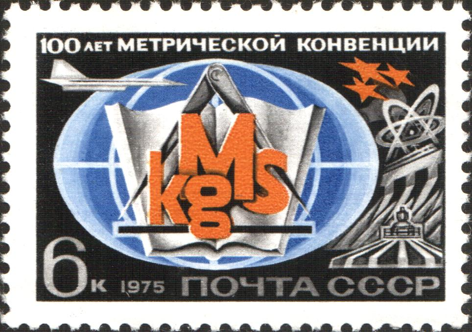 Почтовая марка СССР, выпущенная ко столетнему юбилею Международной метрической конвенции, в марте 1975 года. На фоне стилизованного изображения земного шара изображены циркуль, раскрытая книга, латинские обозначения килограмма, секунды и метра. А также летящий самолёт, звёзды, символ науки. Художник — Ю. Арцименев. Тираж — 4,2 млн. Номер по каталогу ЦФА — 4442.